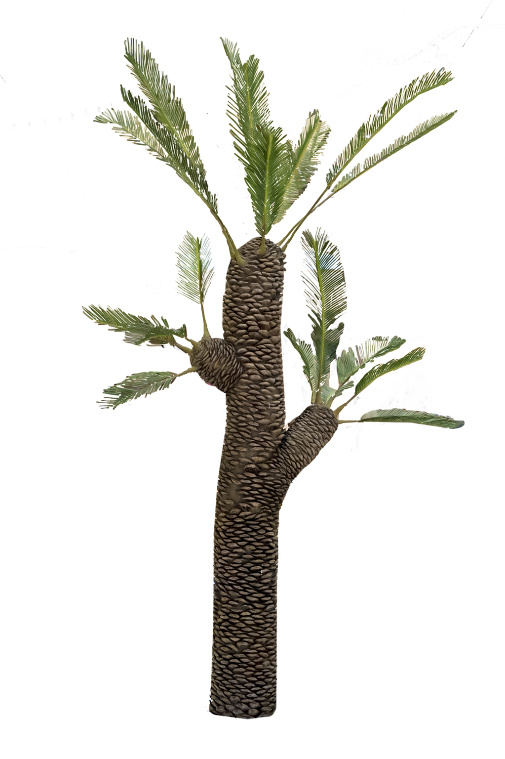 Ricostruzione in scala 1:1.